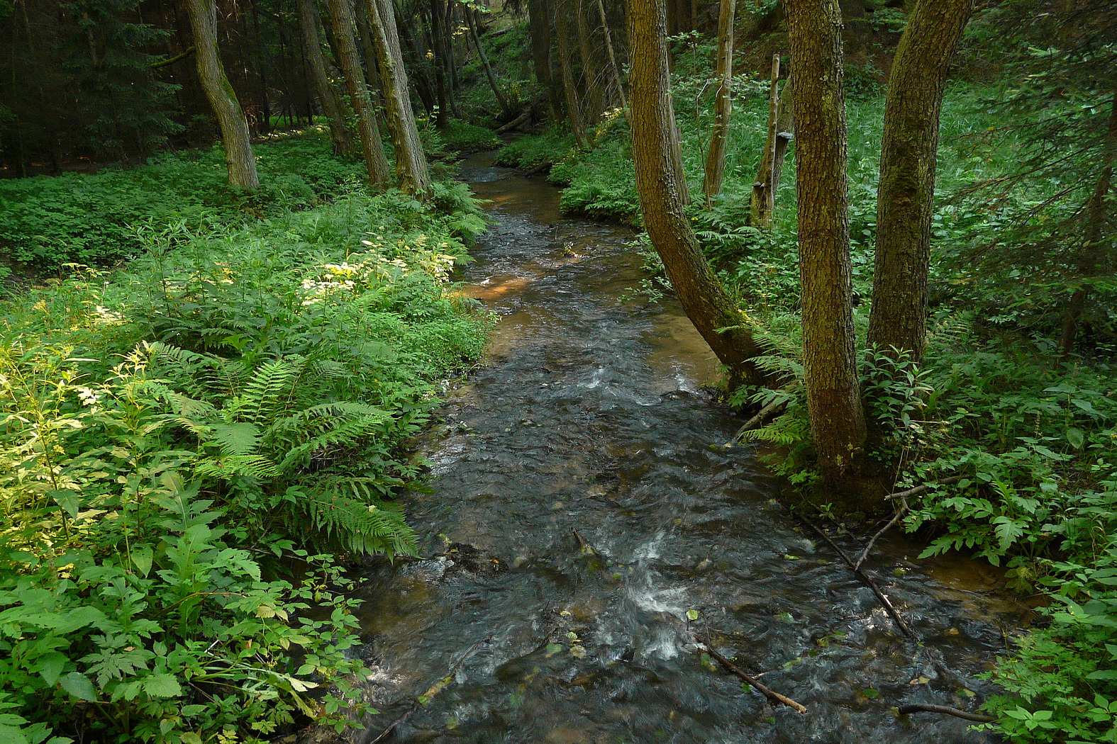 Zábrdka u Kozmic